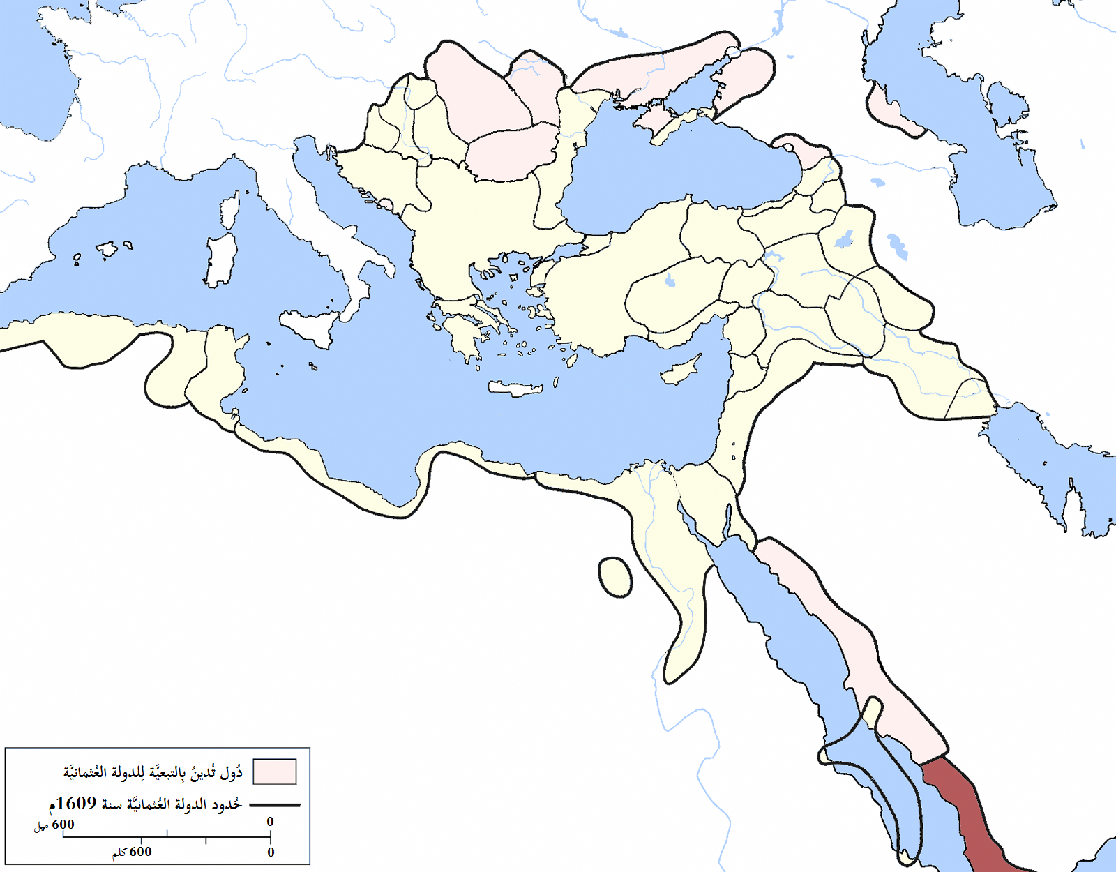 إيالة اليمن بِالدولة العُثمانيَّة سنة 1609م.